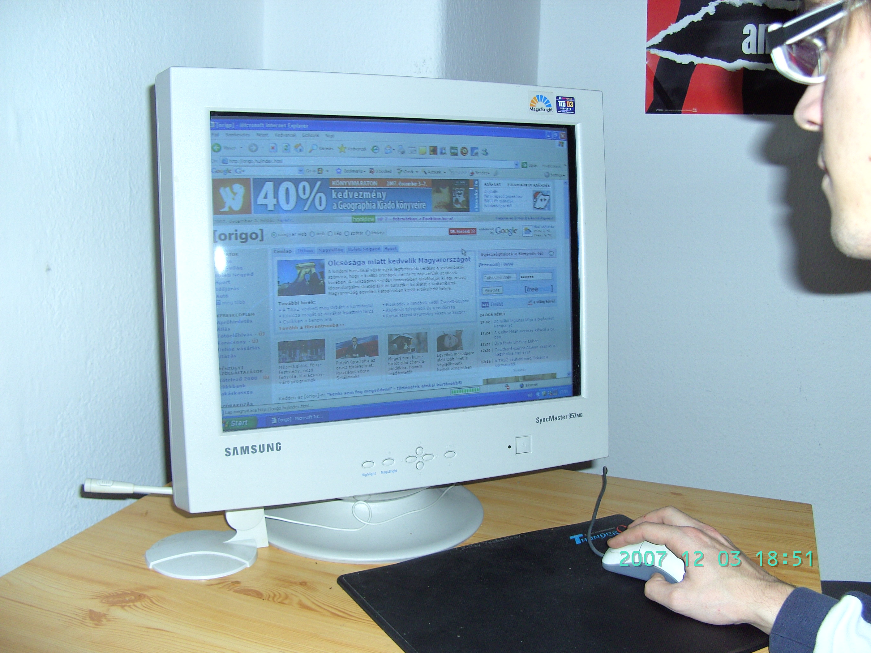 Origo-olvasó 2007-ben